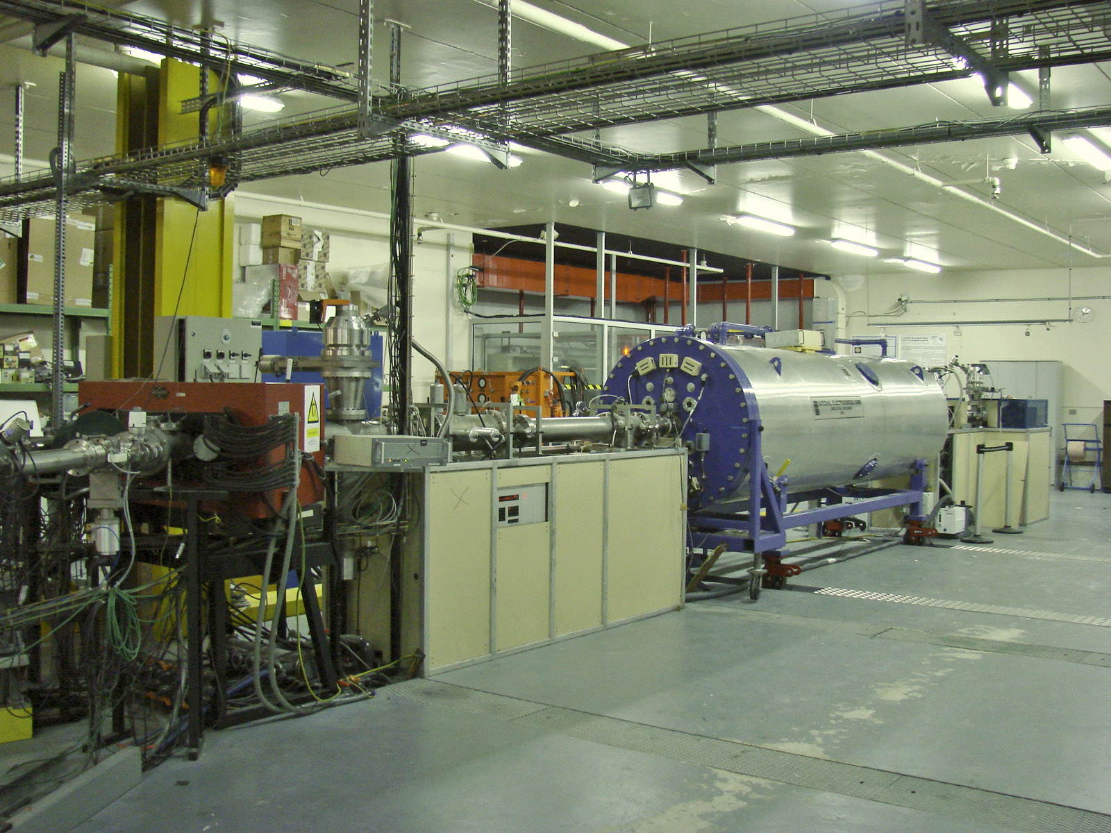 L'accélérateur d'ions AGLAE au C2RMF. Le C2RMF est le Centre de Recherche et de Restauration des Musées de France. Sa filière consacrée au développement des méthodes d'analyse des biens culturels s'est constituée autour de l'accélérateur de particules AGLAE (acronyme pour Accélérateur Grand Louvre d'Analyse Elémentaire). Elle fait également partie d'une unité mixte de recherche avec le CNRS. Au fil des années, AGLAE est devenu le prototype des instruments d'analyse non destructive, particulièrement bien adapté à l'étude des oeuvres d'art.